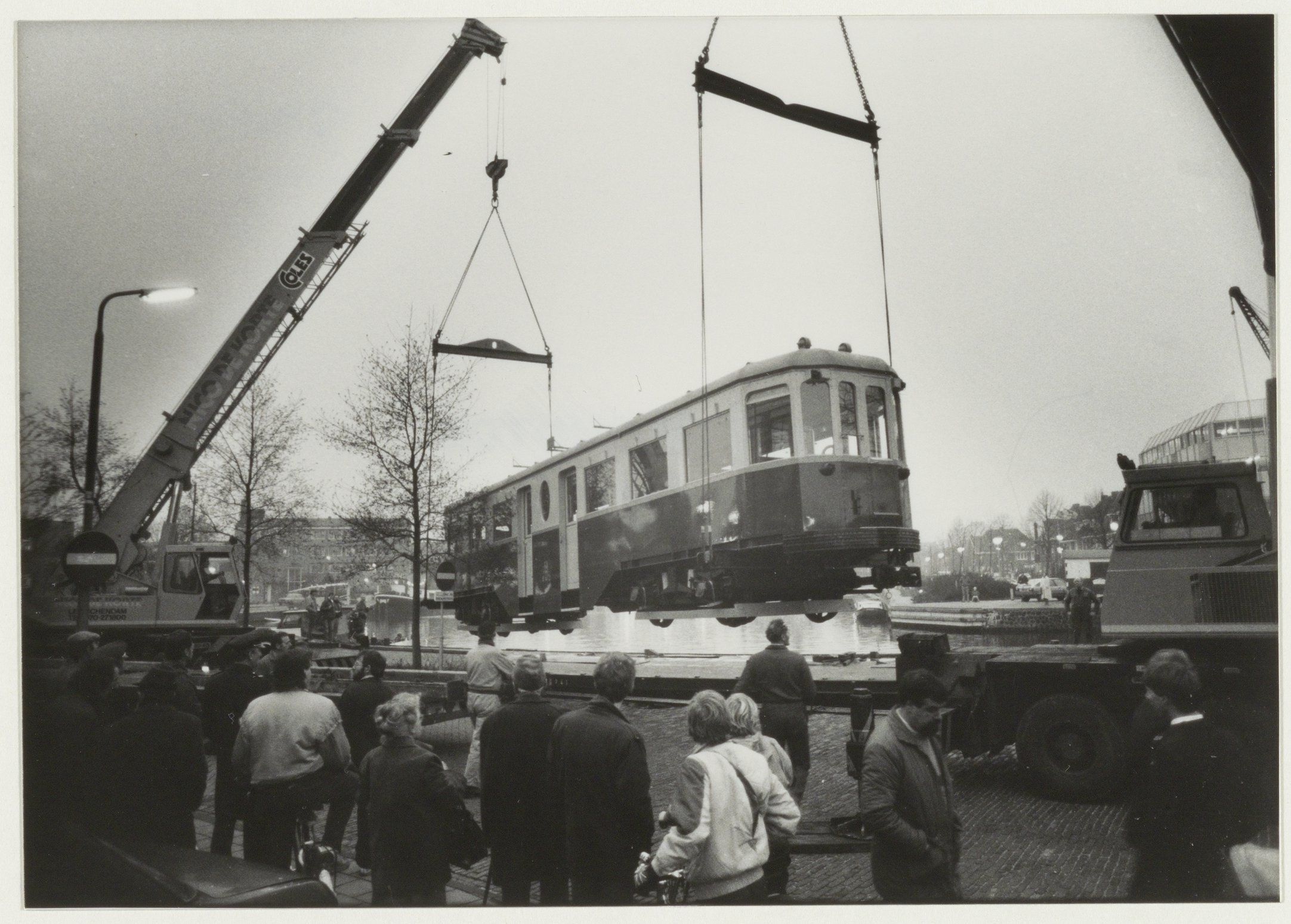 CollectieCollectie Fotoburo de BoerInventarisnummerNL-HlmNHA_54015608NL-HlmNHA_1478_25807KBeschrijvingAankomst van de 'Blauwe Tram' die later per dieplader naar de Leidsevaart wordt vervoerd.FotonummerNL-HlmNHA_1478_6201DocumenttypeTopografische prenten, tekeningen en foto'sVervaardigerEngelchor, Jur (UP de Boer) Soort vervaardigerFotograaf AnnotatiesHD131285LandNederland ProvincieNoord-Holland GemeenteHeemstede PlaatsHeemstede Begindatum1985Einddatum1985TechniekFoto TrefwoordenTrams, Havens